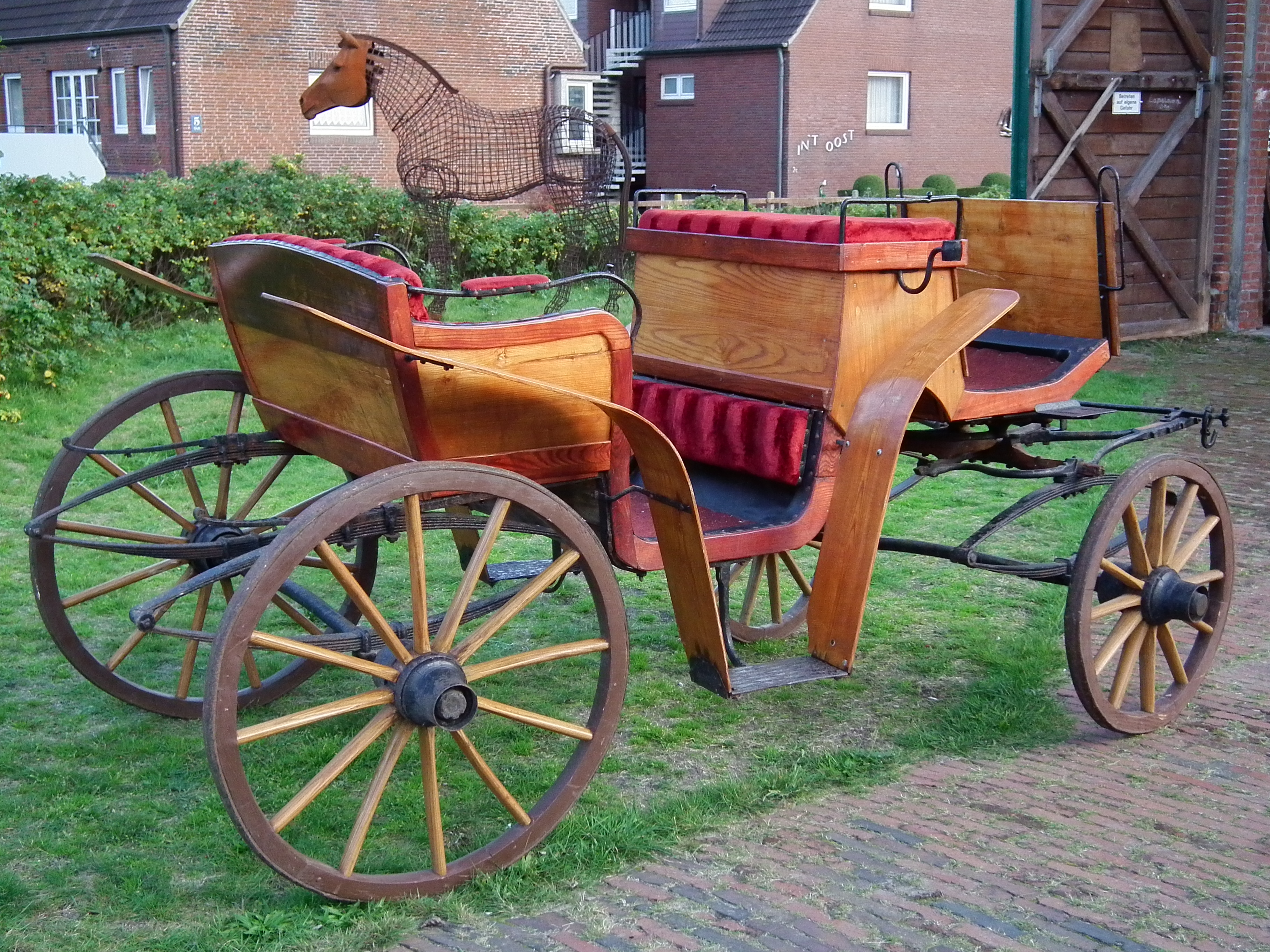 Holzkutsche, fotografiert auf der ostfriesischen Nordseeinsel Juist (Niedersachsen, Deutschland)